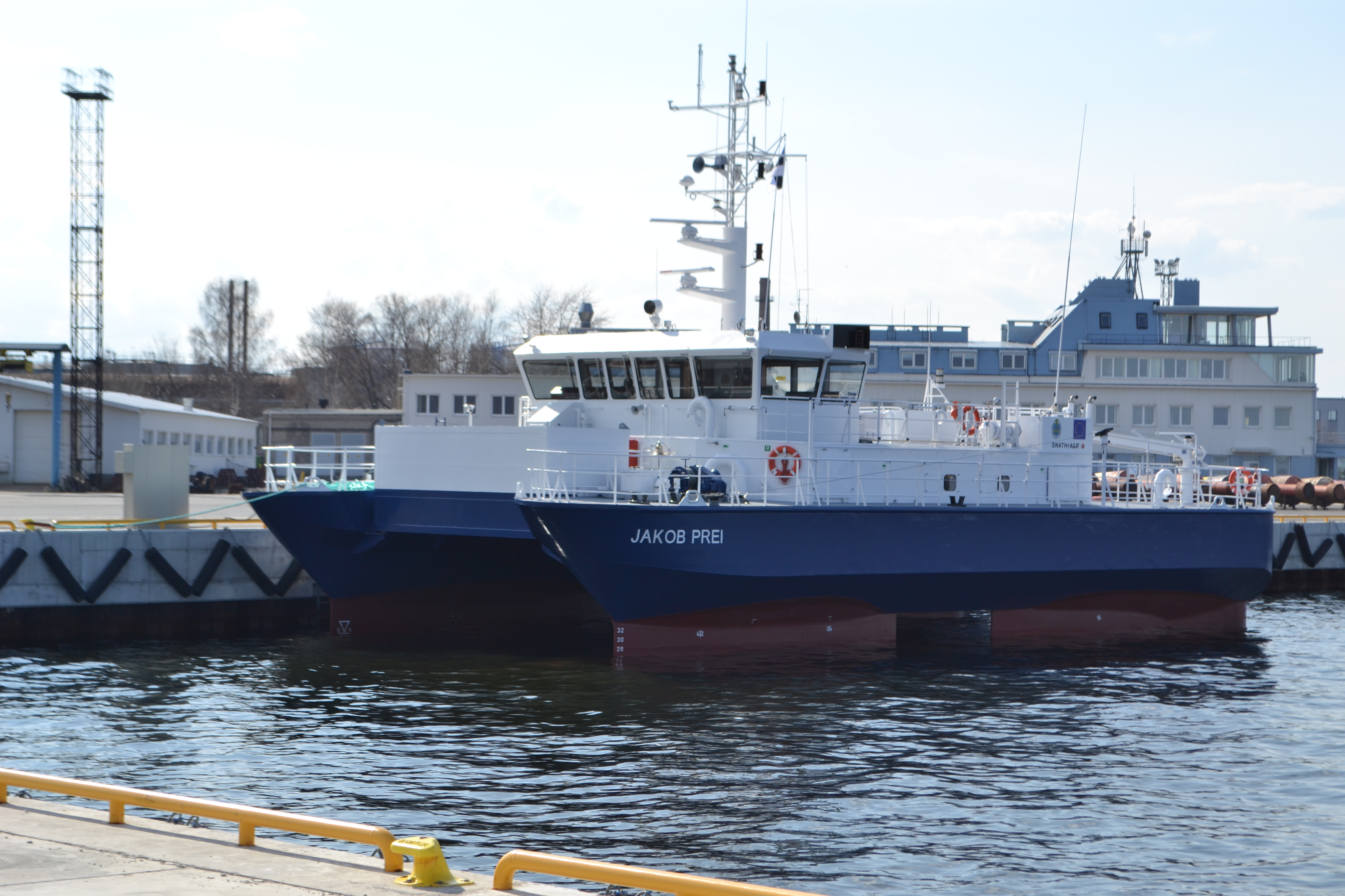 Veeteede Ameti ujuklaev Jakob Prei Hundipea sadamas 22. aprillil 2012. Foto: M. Vaik